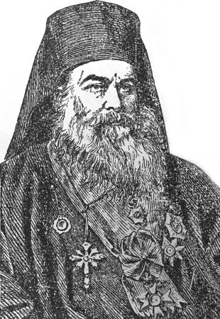 Ξυλογραφία που εικονίζει τον Πατριάρχη Αλεξανδρείας Ιάκωβο Β΄